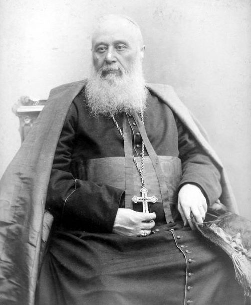 L’Ordre des Pères blancs — nom officiel : Missionnaires d’Afrique — est fondé en 1868 à Maison-Carrée — actuelle El Harrach, Algérie — par le cardinal Charles Lavigerie (1825–1892), archevêque d’Alger, photographié ici à Paris, par Albert Capelle, en 1882.